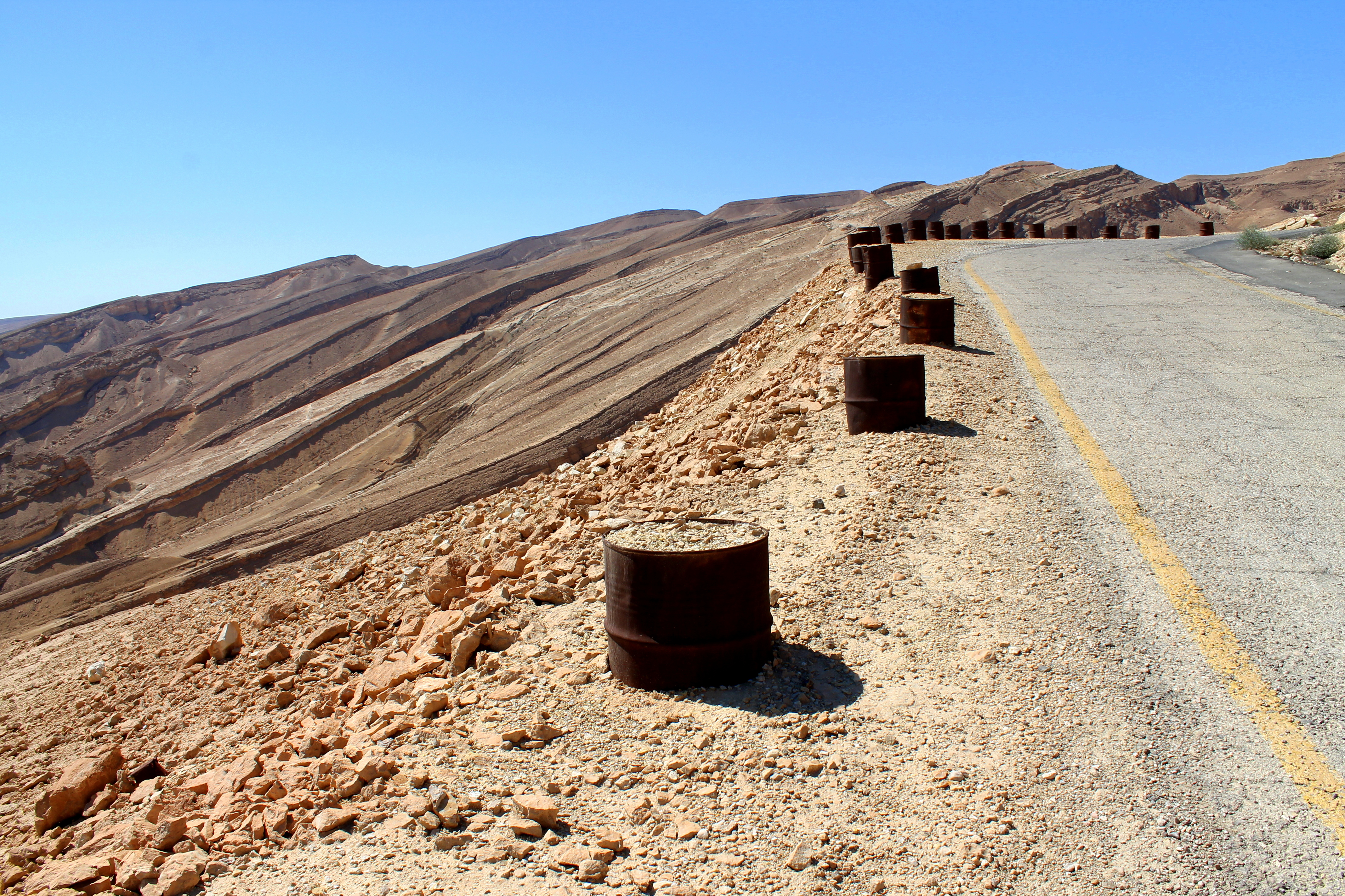 כביש מעלה העקרבים שימש עד 1956 כדרך הראשית לאילת המייחד את הכביש הן הסרפנטינות - שיטת סלילת דרך בריטית לירידה מפותלת בהדום ההר, מחוזקת בטרסות ומסומנת בחביות. כיום הכביש הוא אתר מורשת לשימור. במקום נקודת תצפית על הכביש , הערבה , נחל צין והדרך הרומית שעברה במקום - עם הסברים קצרים.